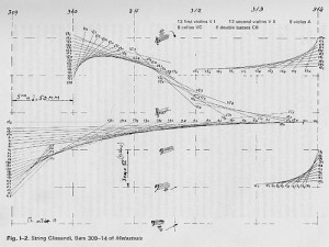 Xenakis